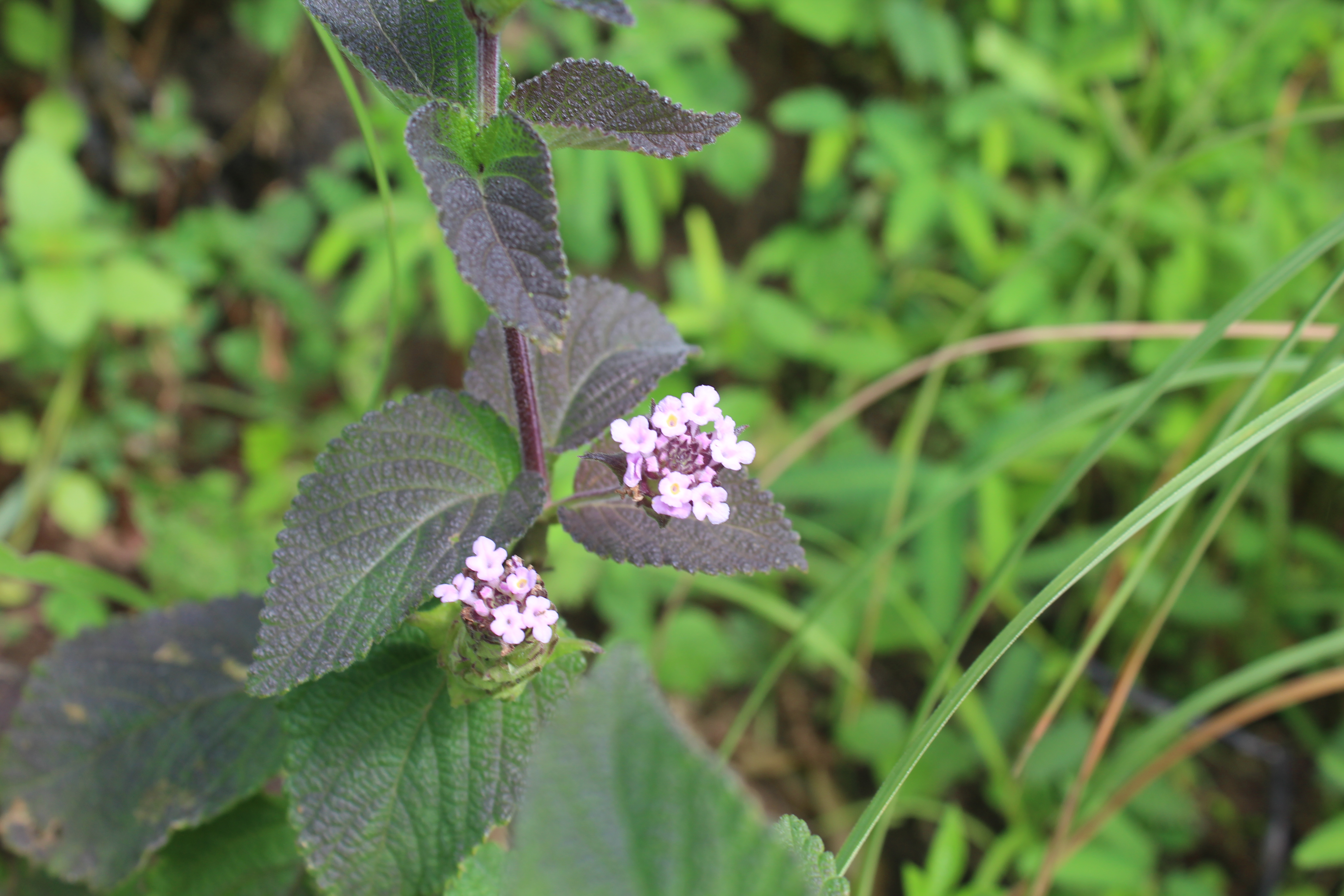 അരീപ്പൂ